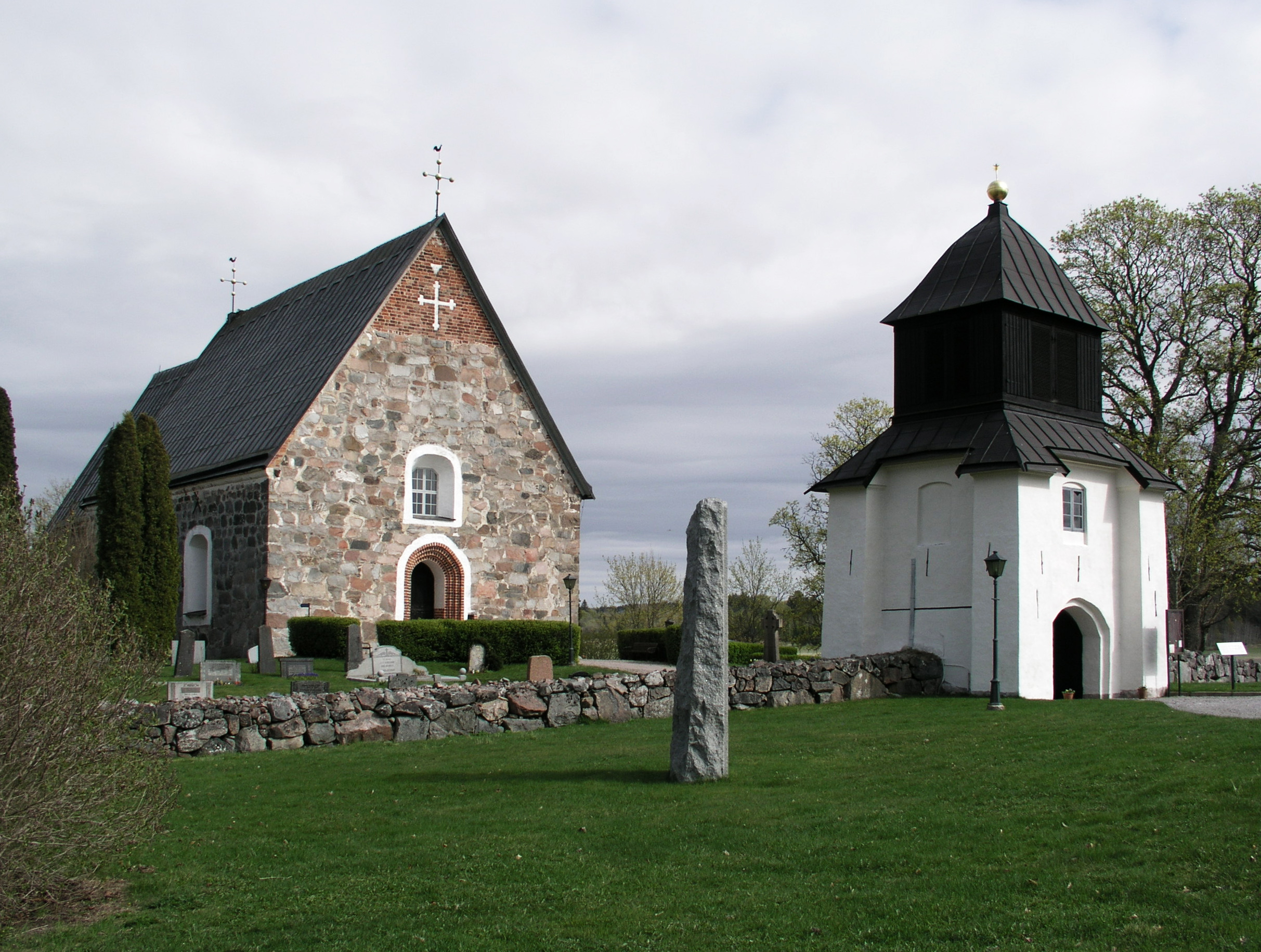 Skederids kyrka / Skederids church, Diocese of Uppsala, Norrtälje kommun.